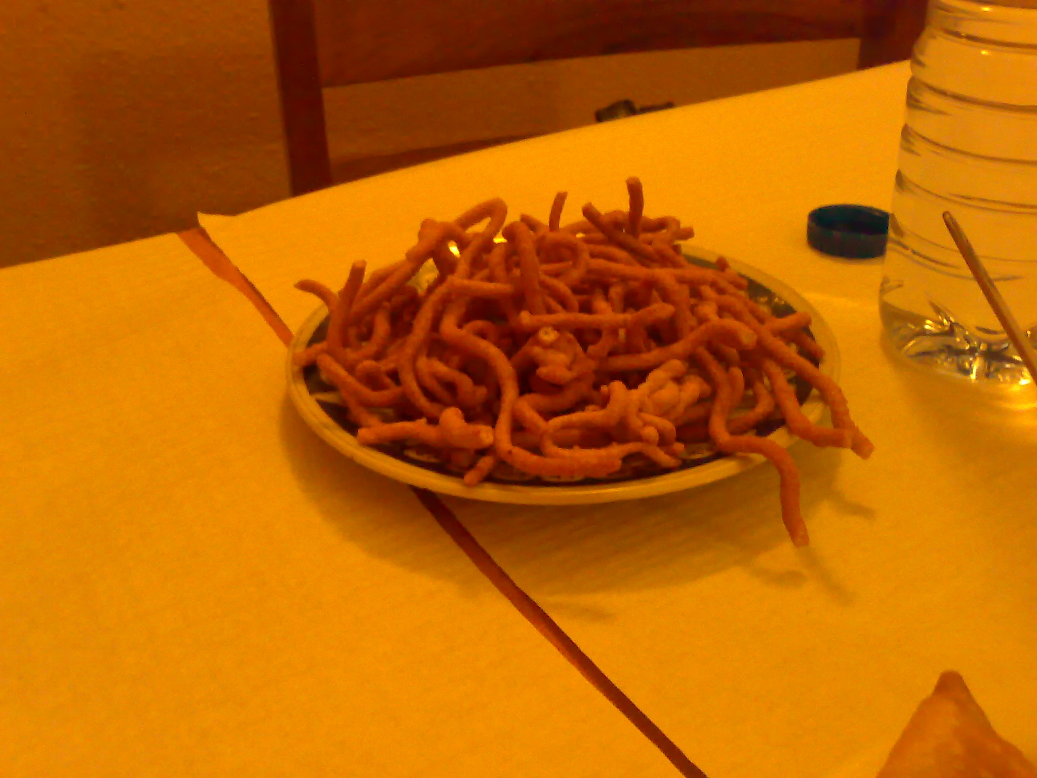 Xéu, um aperitivo de Goa (an appetizer from Goa).